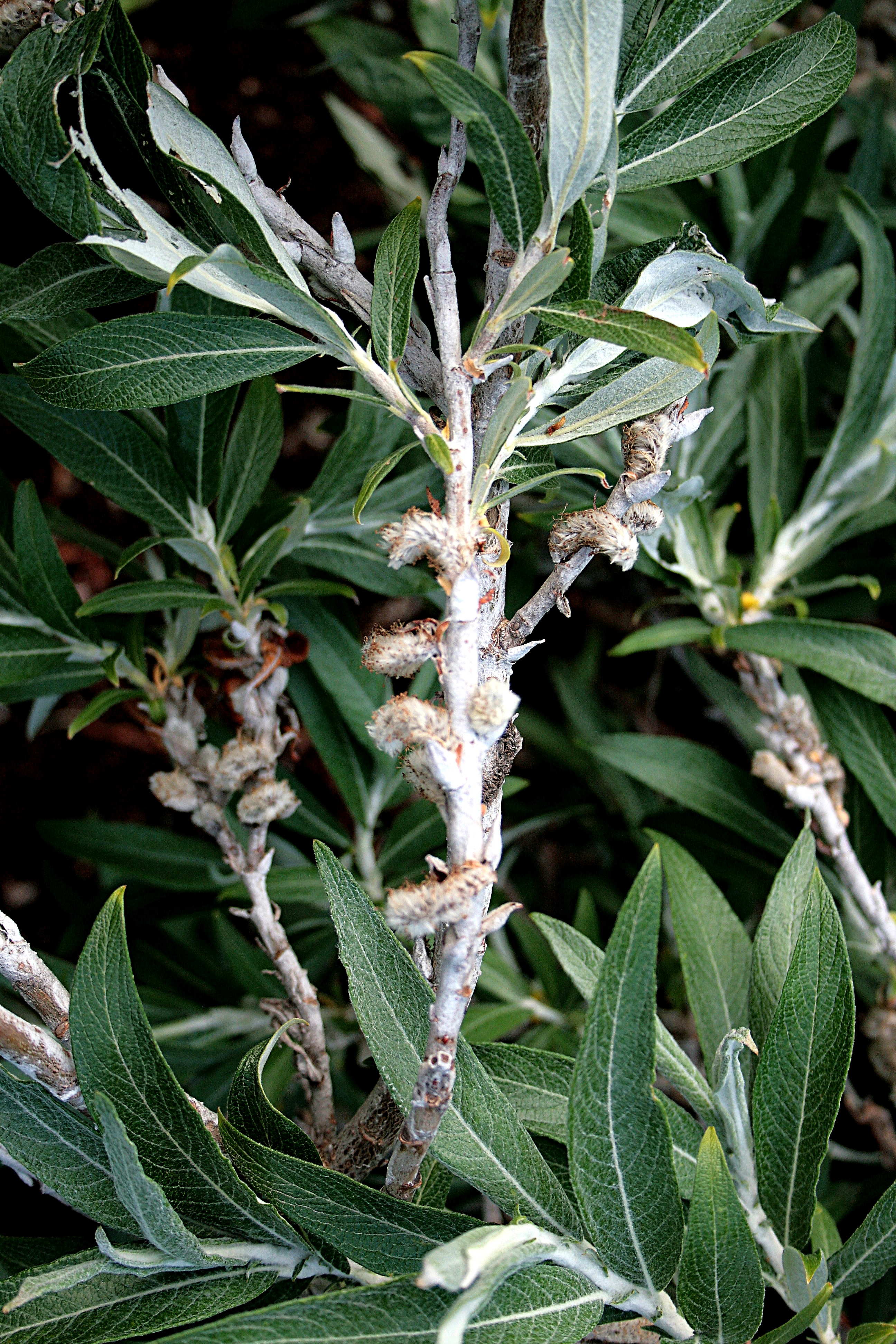 Ísland, Akureyri Botanical Gardens: Weide Salix_candida